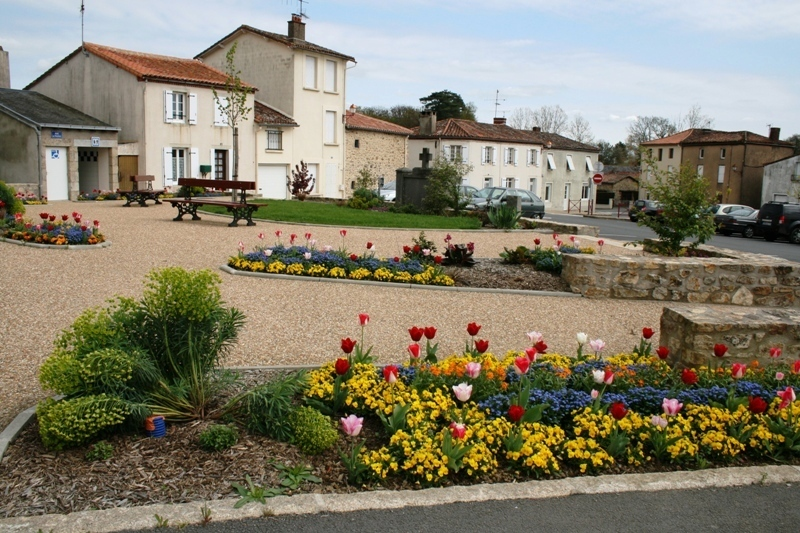 Français